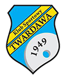 Logo KS Twardawa